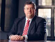 Hubert Bruls, Burgemeester van Nijmegen, voormalig burgemeester van Venlo. CDA.